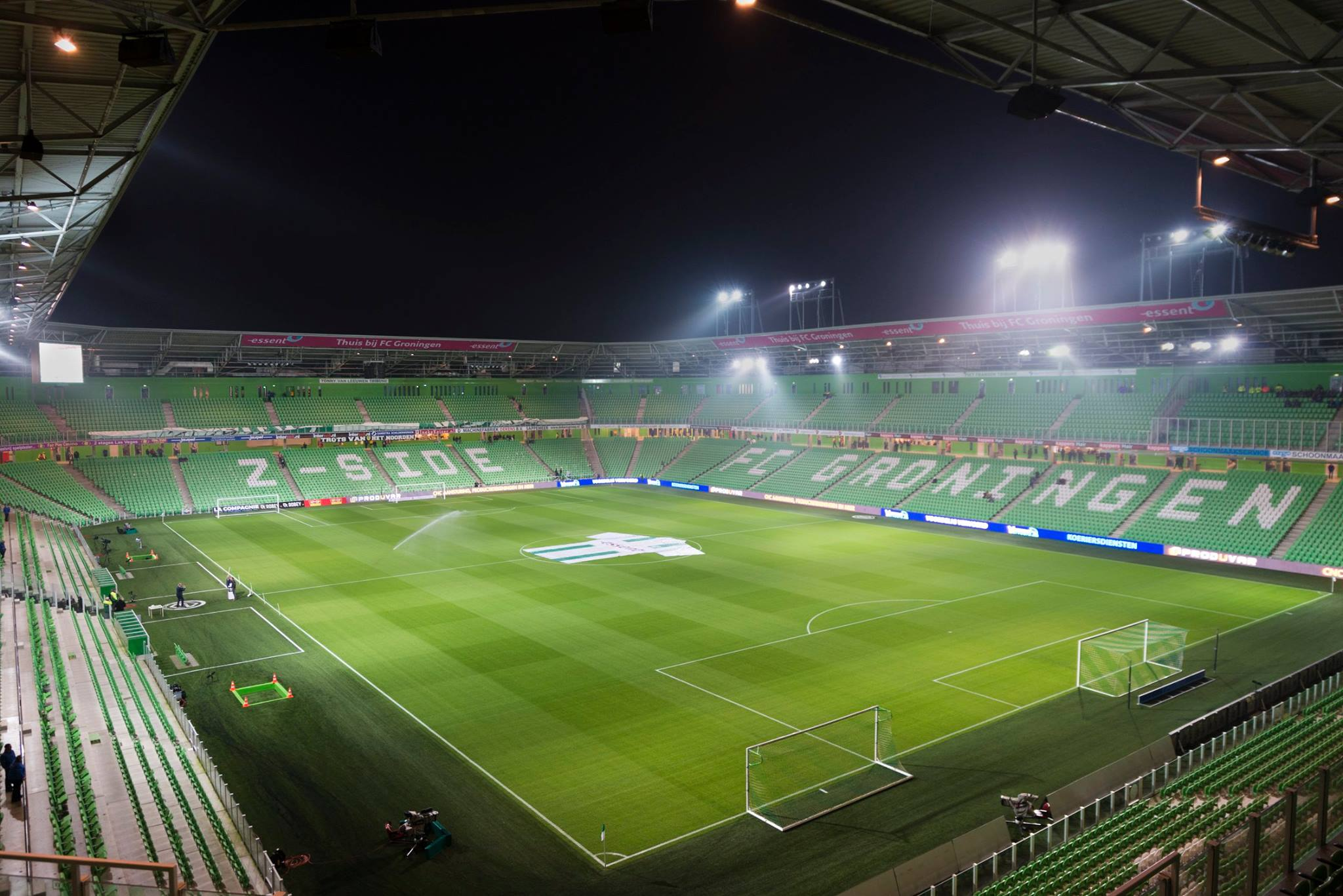 Hybride grasmat van het Noordlease Stadion in Groningen voor de wedstrijd FC Groningen - SC Heerenveen